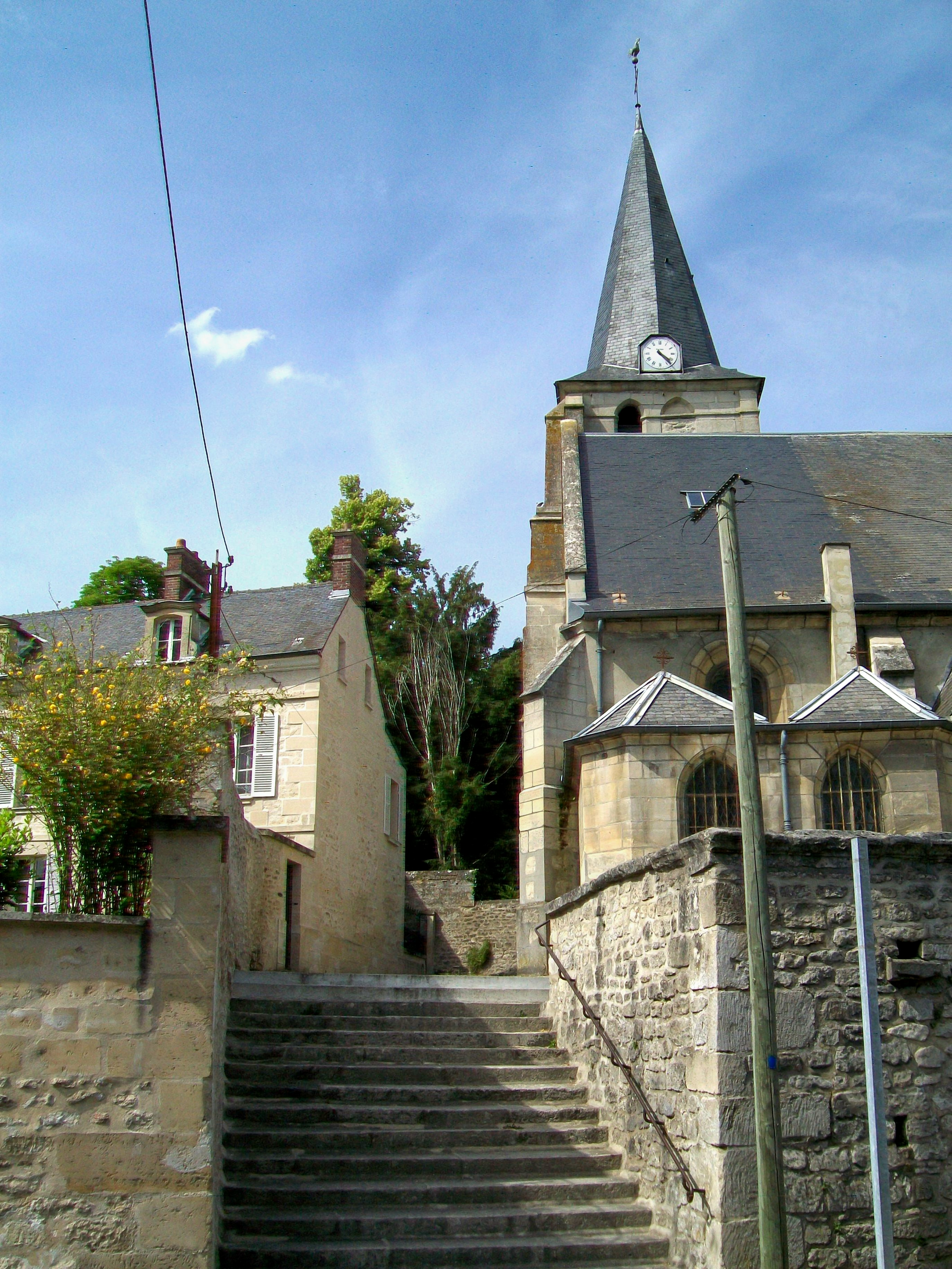 La sente de l'église, qui commence par un escalier au départ de la rue de Senlis (D 924). A droite, l'église Saint-Firmin ; à gauche, l'ancien presbytère. Ensuite, la sente continue jusu'au cimetière où elle se termine en cul-de-sac.